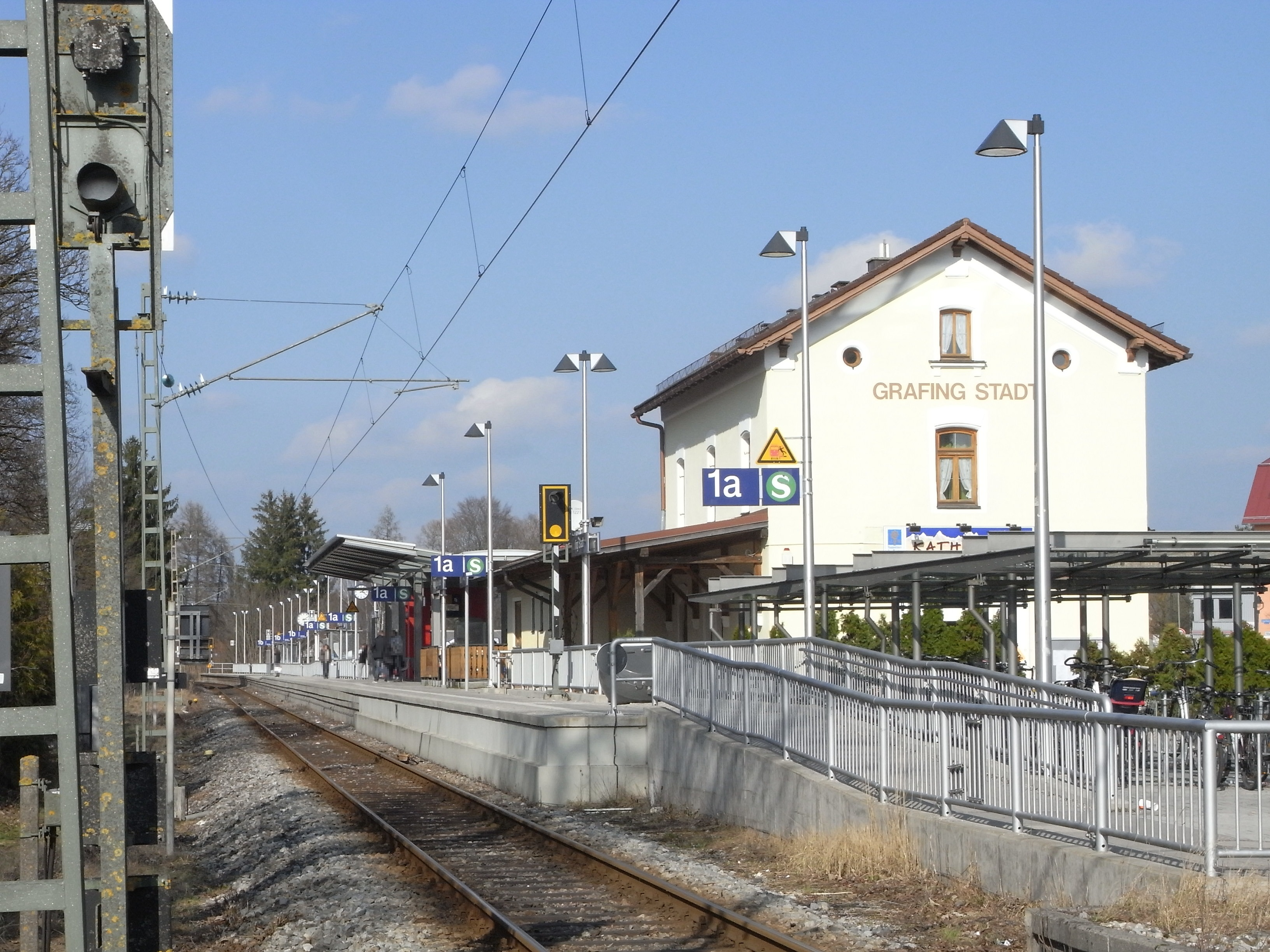 Haltestelle "Grafing Stadt" der S-Bahn München.